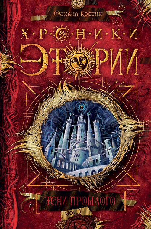 Обложка книги М. Костина «Хроники Этории. Тени прошлого».